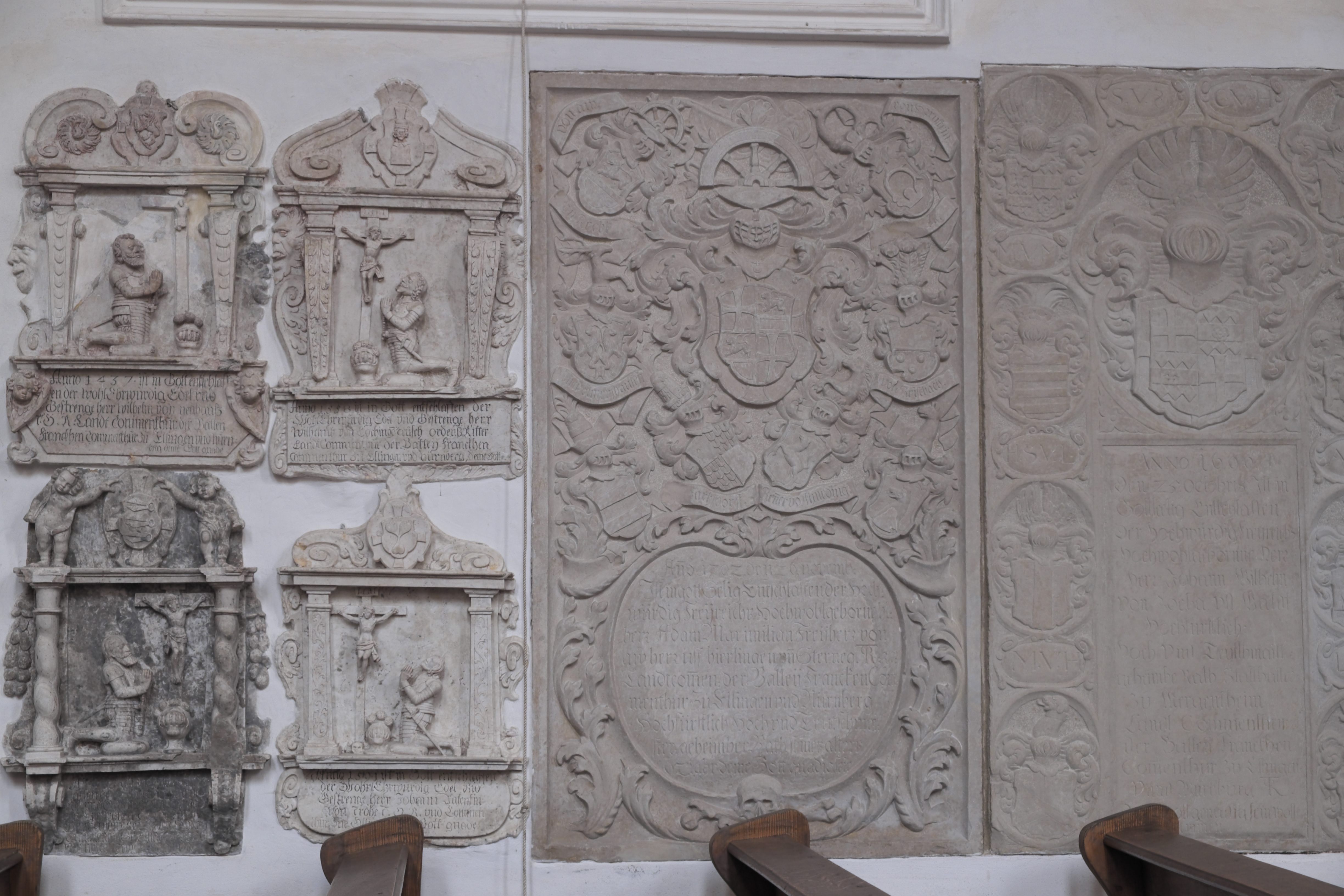 Schlosskirche des ehemaligen Deutschordensschlosses in Ellingen im Landkreis Weißenburg-Gunzenhausen (Mittelfranken/Bayern), Epitaphien, die beiden rechten sind die Grabmale der Landkomture Adam Maximilian Freiherr von Ow auf Hierlingen und Sternegg (1691–1702) und Johann Wilhelm von Zocha auf Wald (1682–1690)